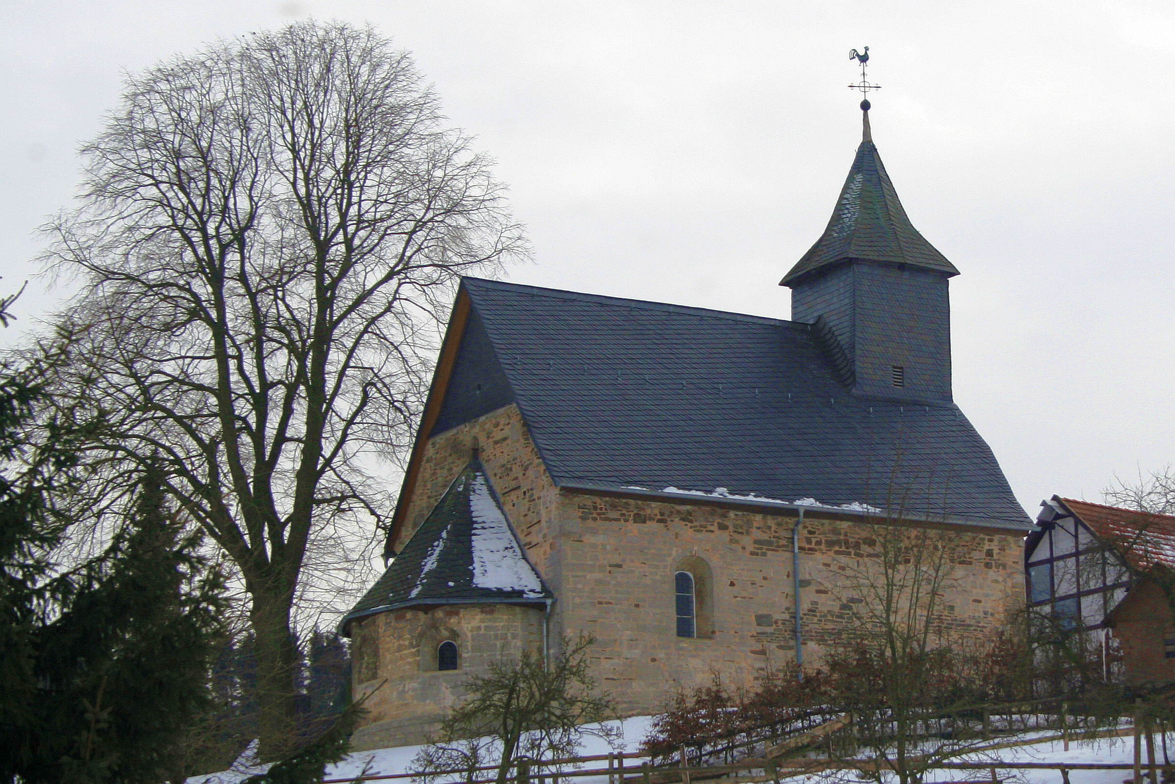 Die romanische St.-Georg-Kirche in Schweinsbühl, Außenansicht